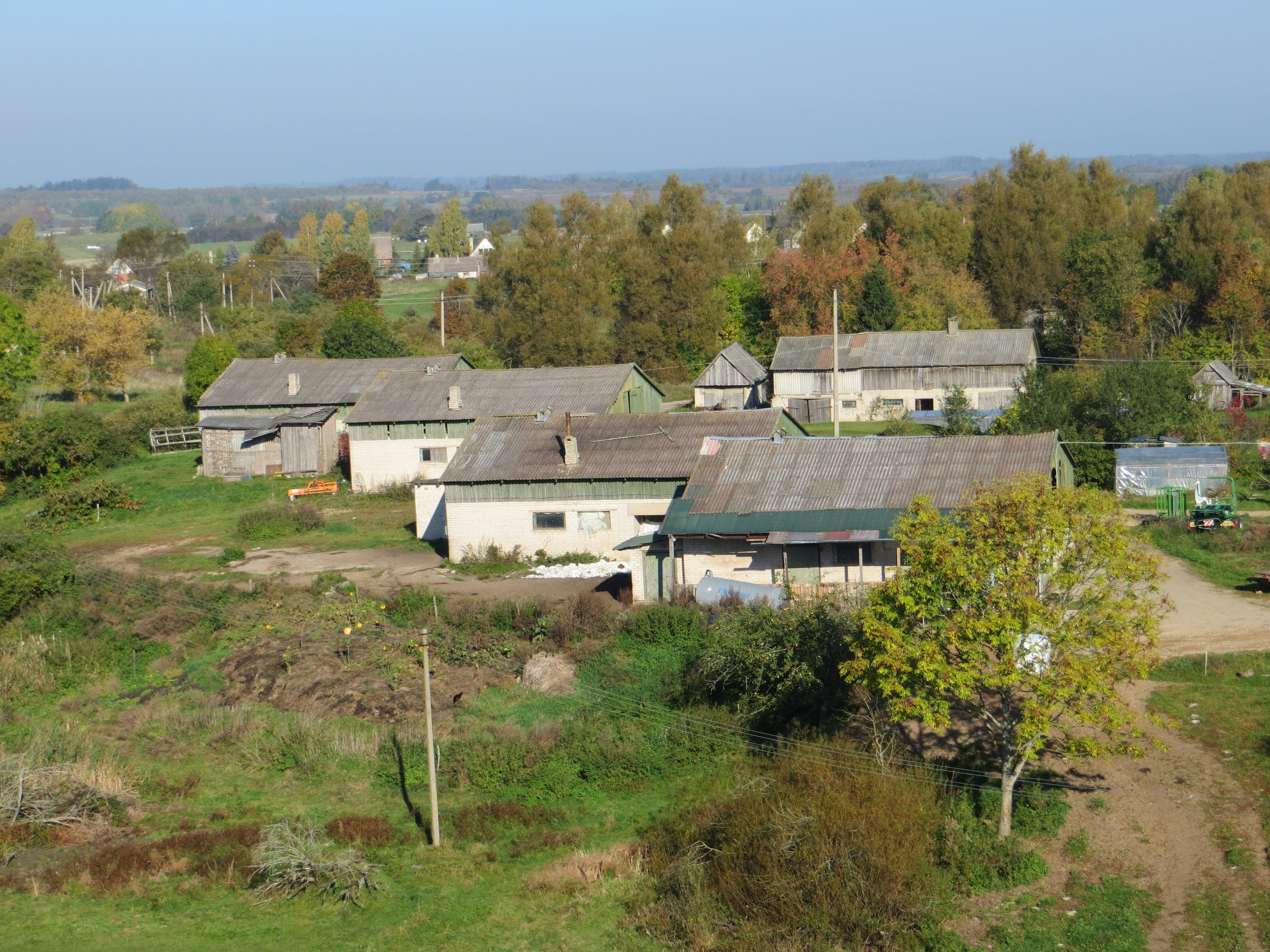 Suvieko sen., Lithuania